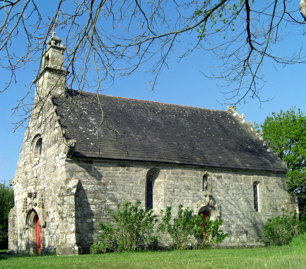 Chapelle de la Salle, Lanmérin